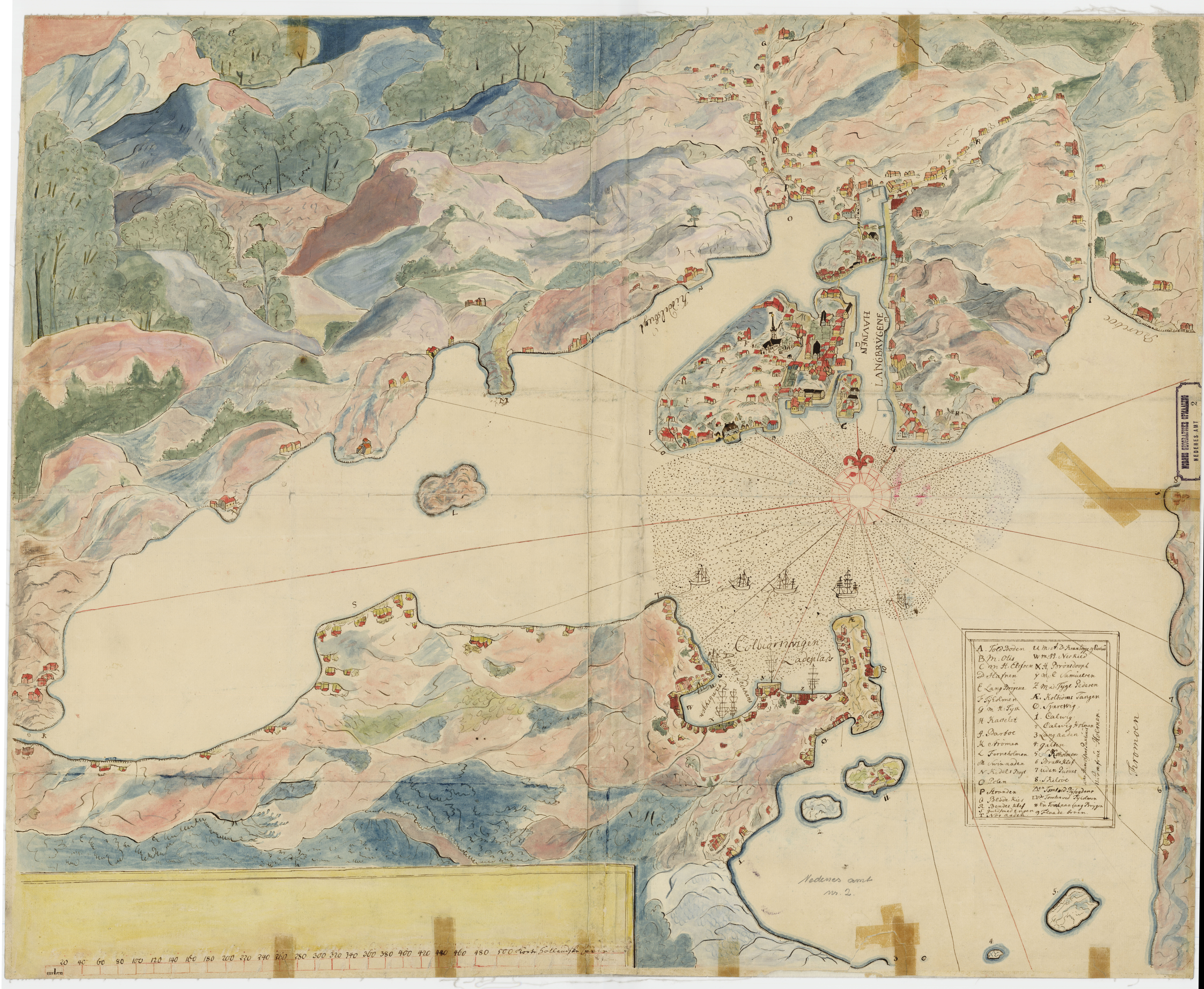 Kart over Arendal og Omegn. (U.T.)